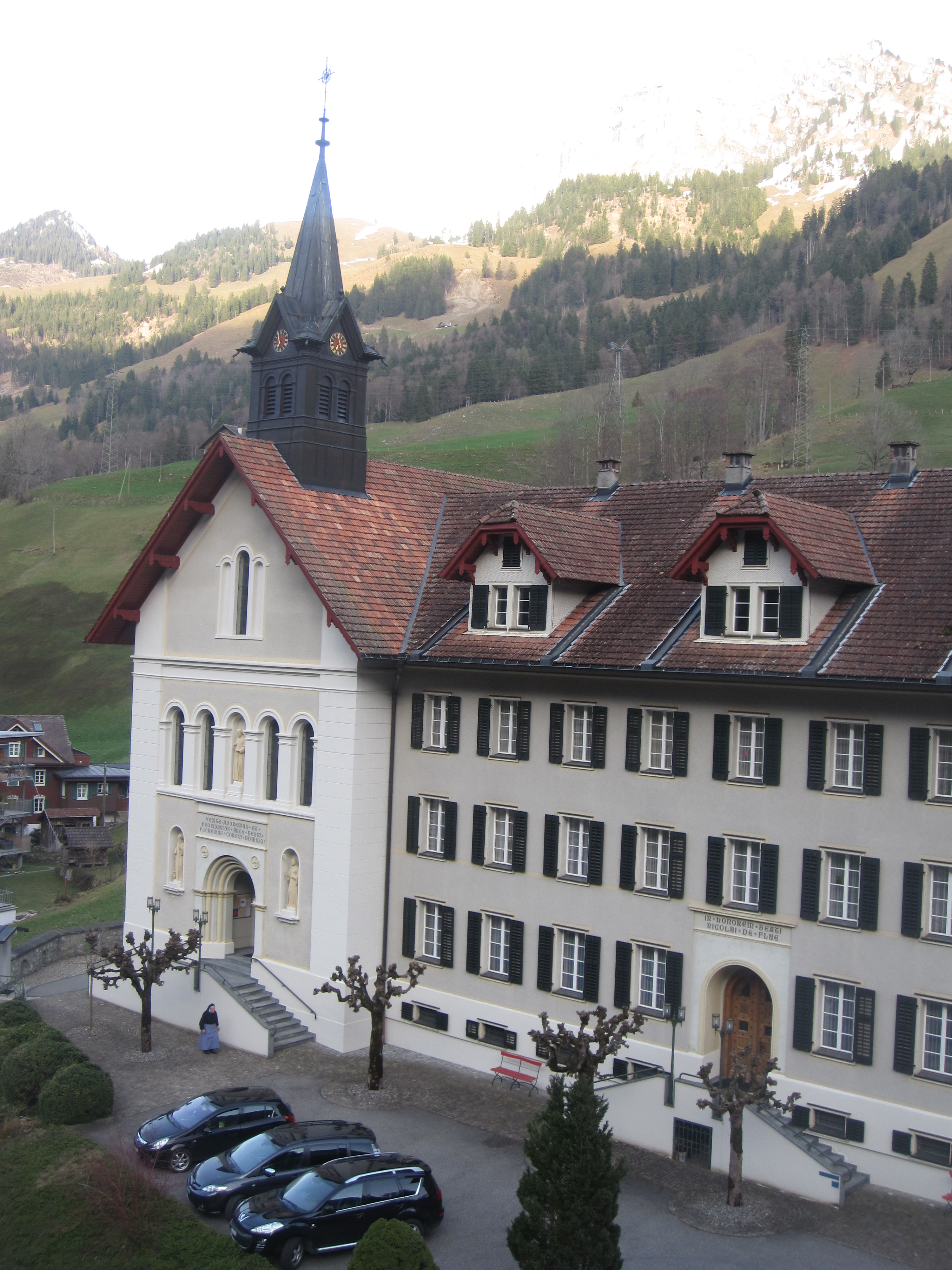 Benediktinnerinnenkloster Melchtal